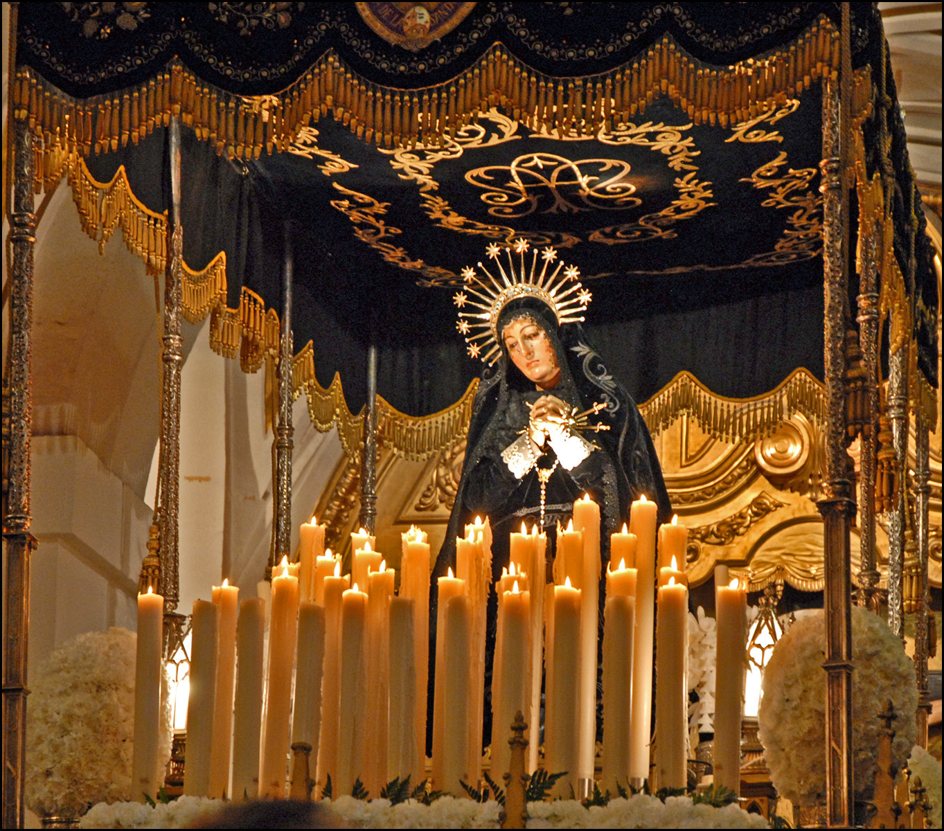 Autel (paso) porté à dos d'homme durant les processions de la semaine sainte pour la commémoration de la Résurrection du Christ (Vierge de douleur) Durant la semaine sainte à Bilbao, 14 processions sont organisées par les différentes Confréries de Pénitents à travers la ville, depuis le dimanche des Rameaux jusqu'à celui de Pâques. Bilbao célèbre Pâques depuis 1554, l'année de fondation de la "Guilde" des Pénitents de Vera Cruz.